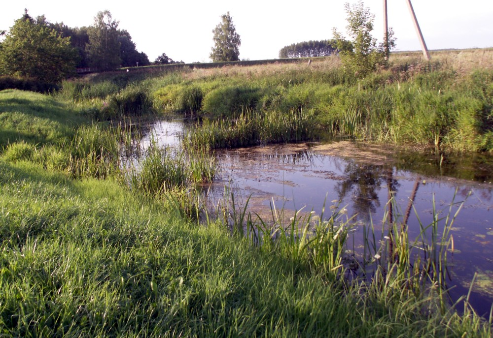 Apaščia Anglininkuose